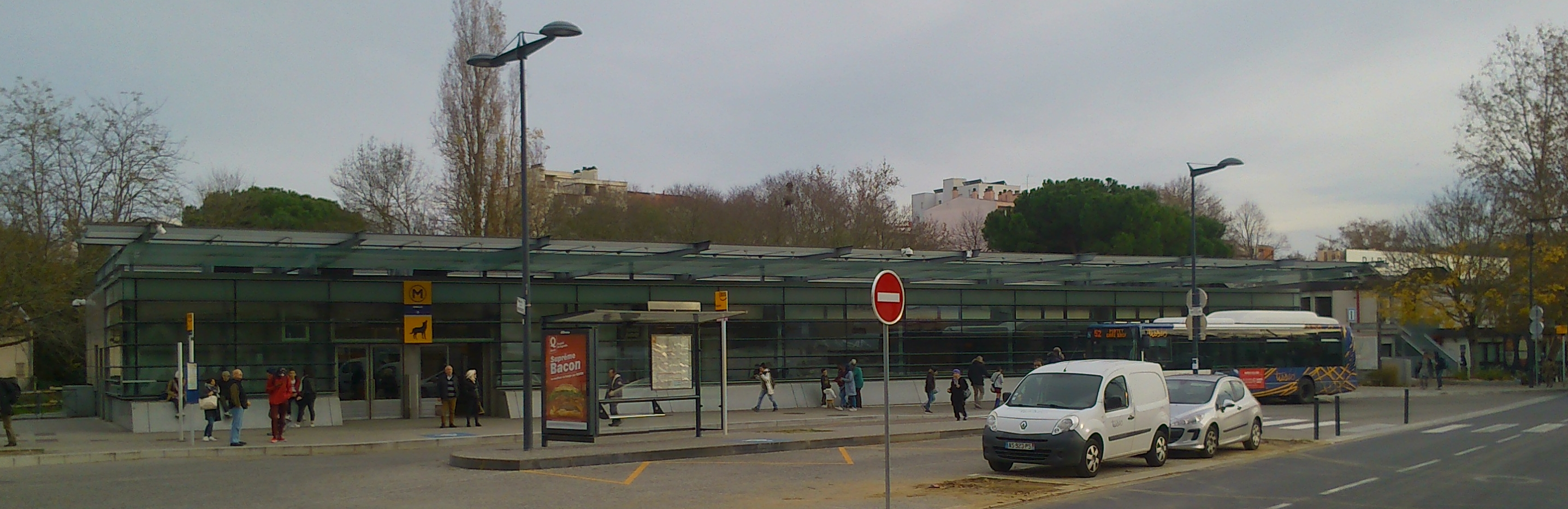 Bâtiment de la station Empalot de la ligne B du métro de Toulouse